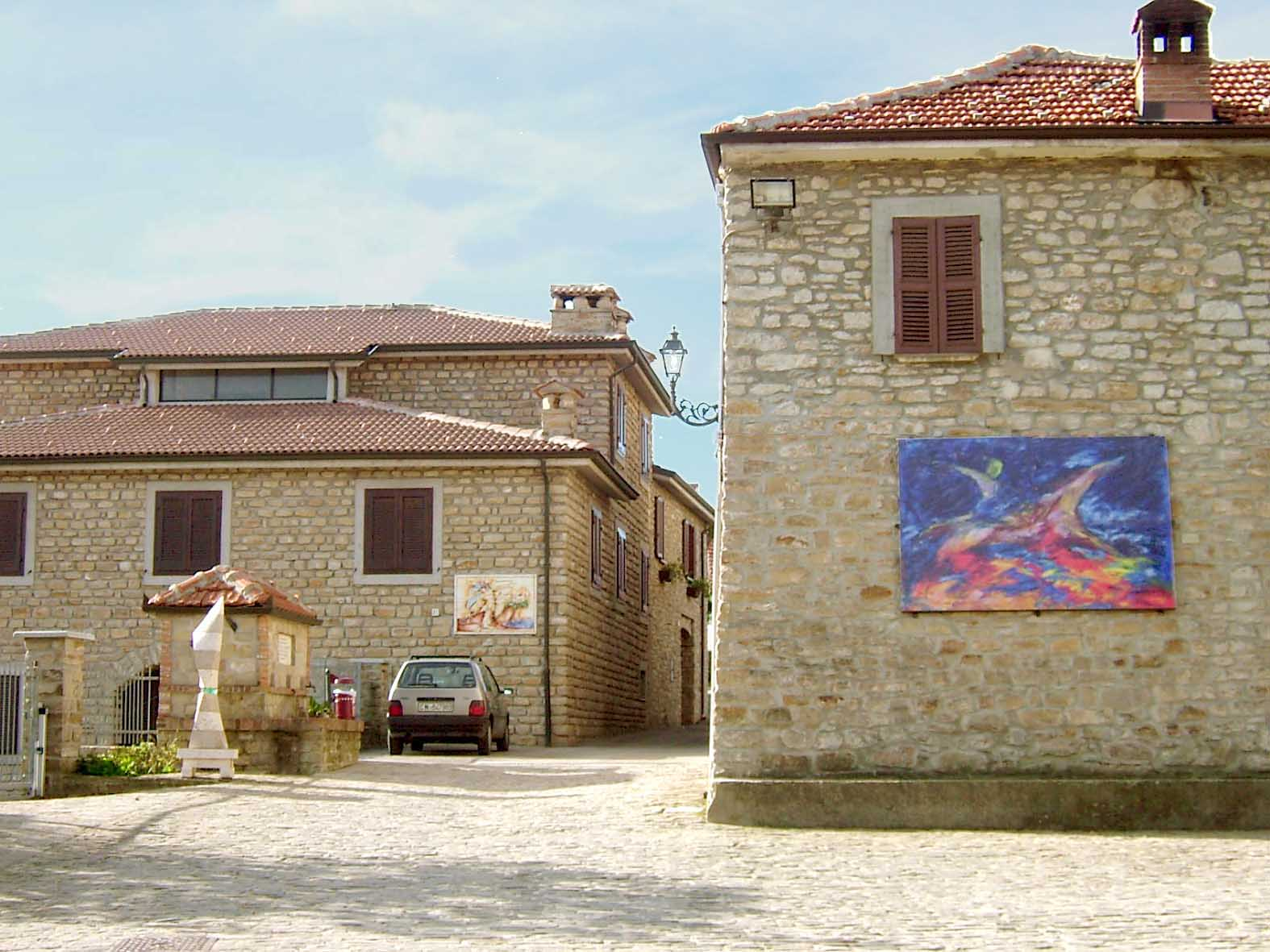 Bergolo CN